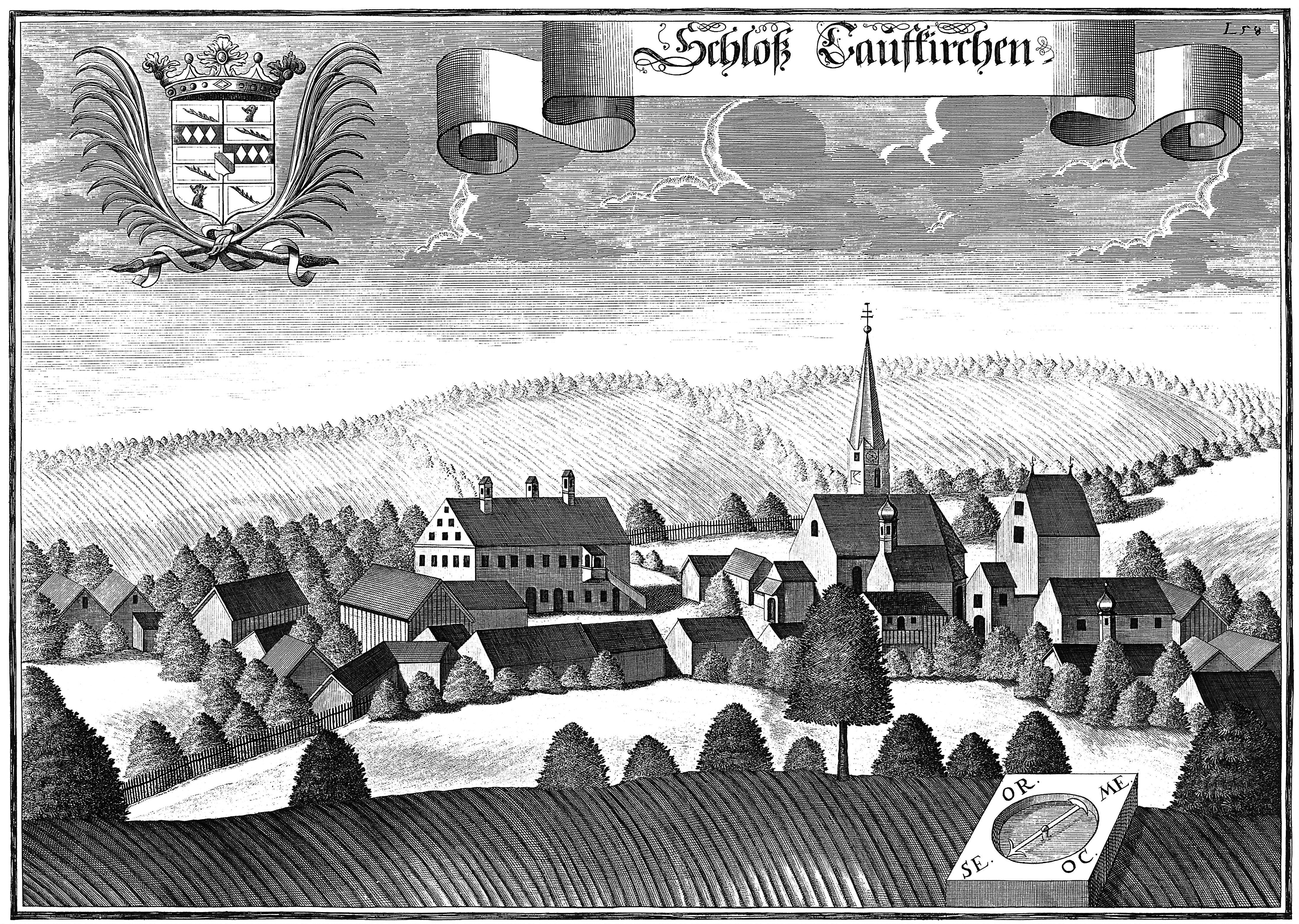 Schloss Taufkirchen nach einem Stich von Michael Wening von 1821